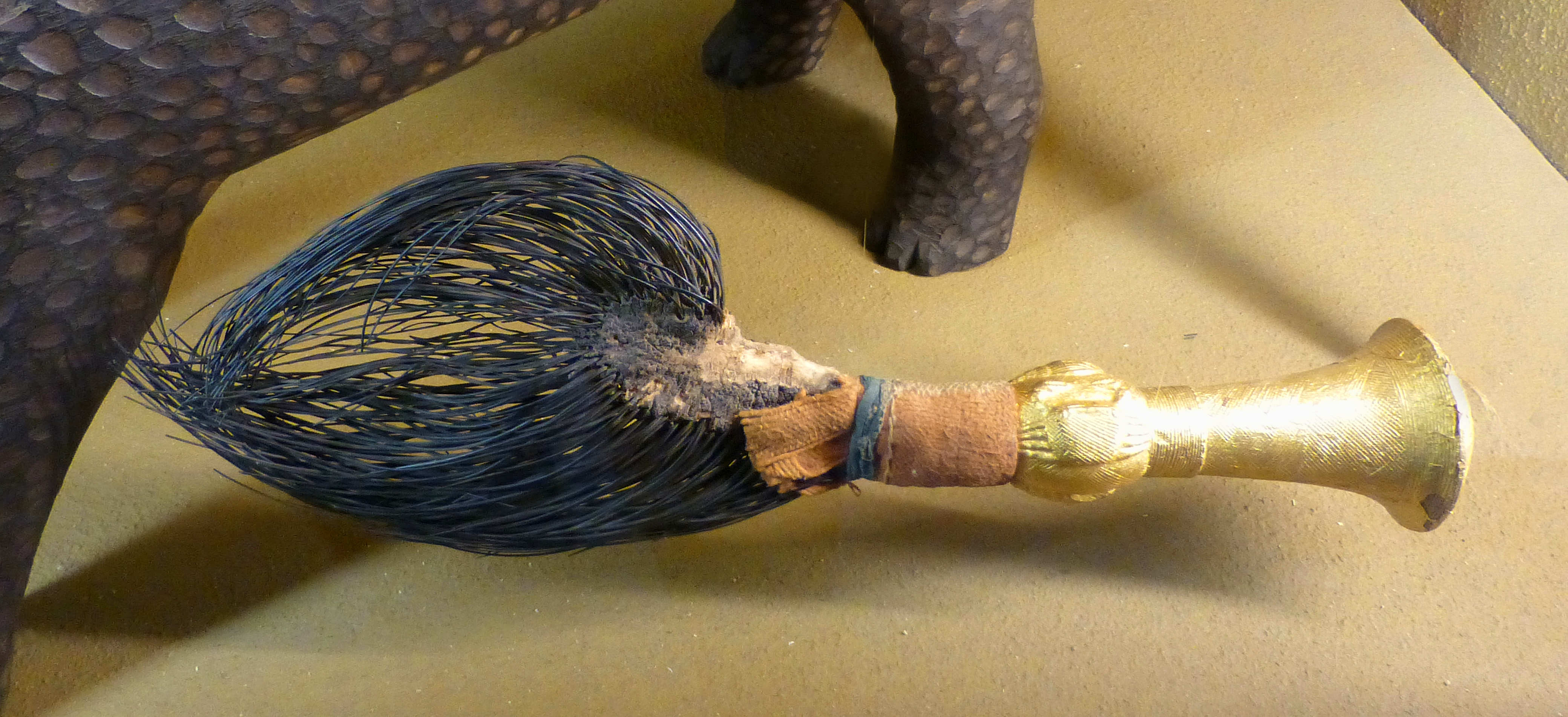 Insigne du pouvoir. Adioukrou. Côte d'Ivoire. Entre 1910 et 1950. Queue d'éléphant, tissu, bois et feuille d'or. Musée africain de Lyon.